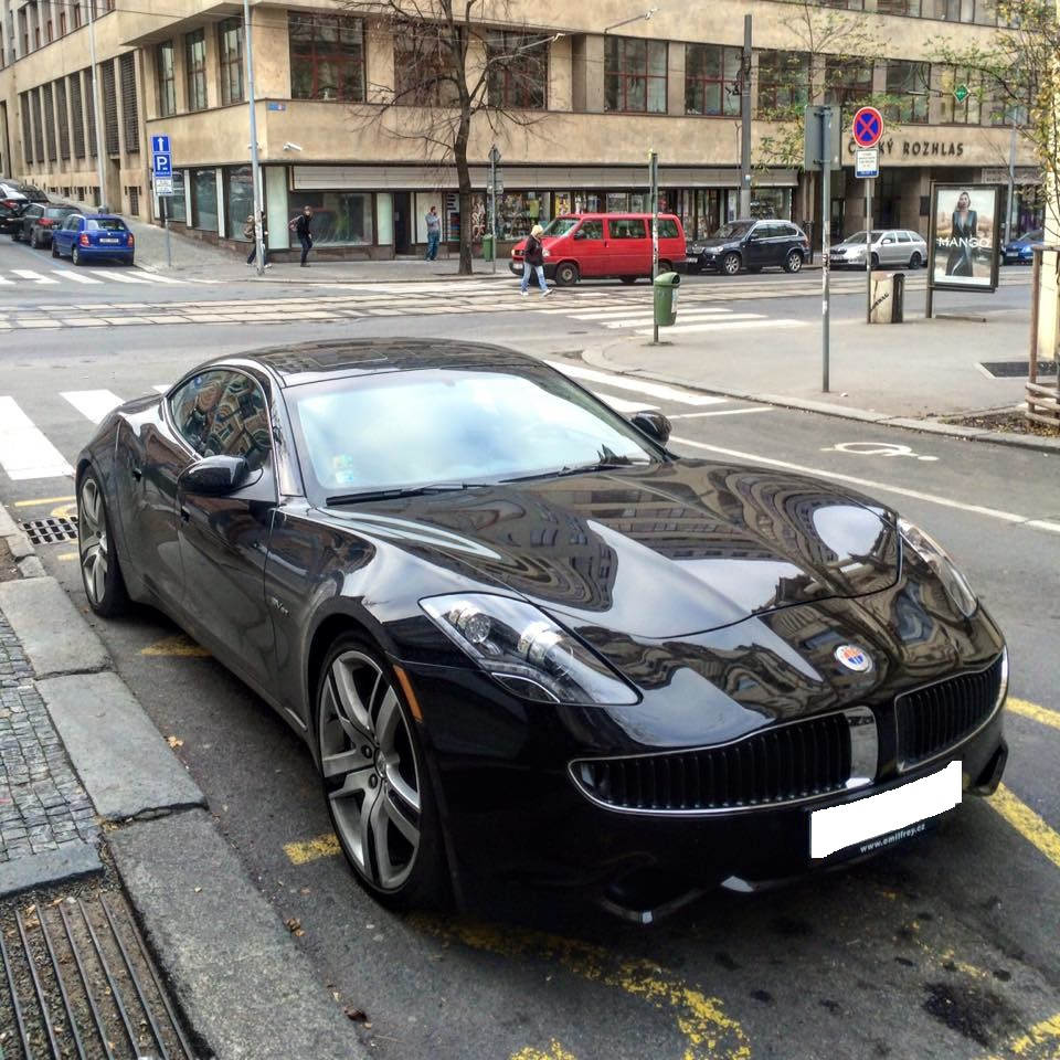 Fisker Karma spatřen v Praze